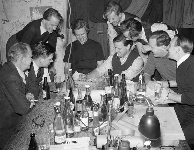 Tidningen Blandarens redaktion i Tekniska Högskolans studentkårs kårhus på Drottning Kristinas Väg 15 in Stockholm. Fr.v. Engströmer, Olsson, Lindroos, Thafvelin, Molander, Thafvelin, Asplund, Knutsson och Orlando